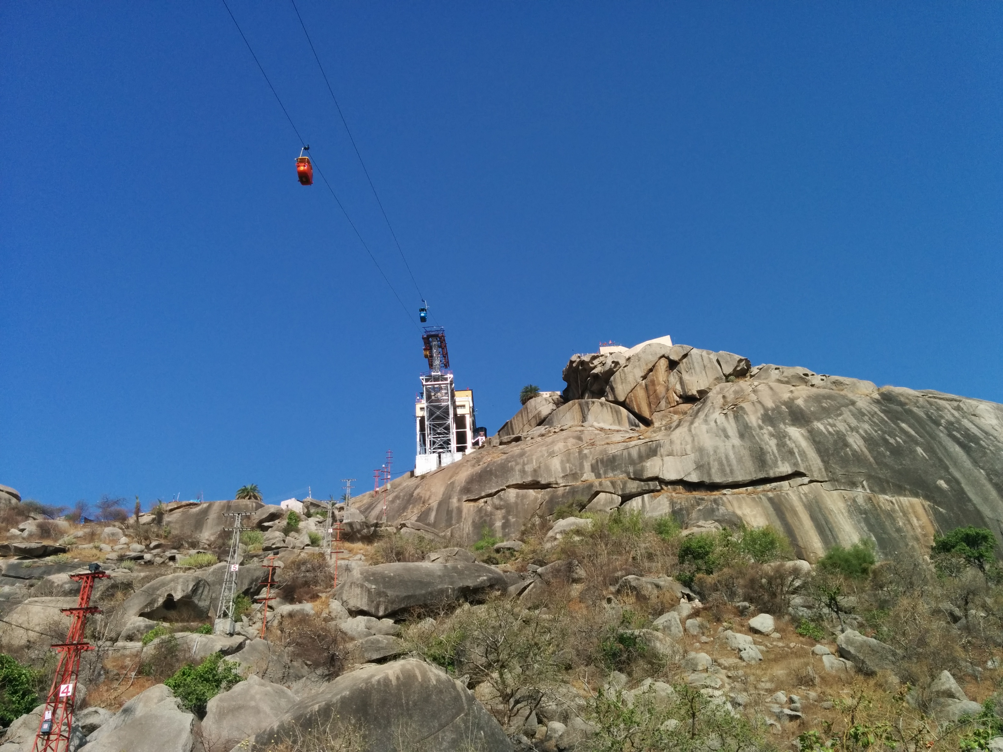 Gabbar temple near Ambaji, Gujarat